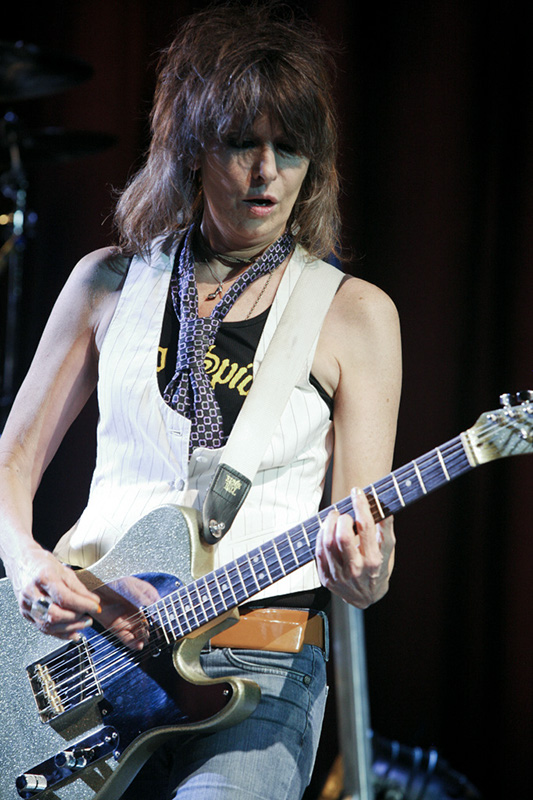 © 2001-13 Photo-Grafitti